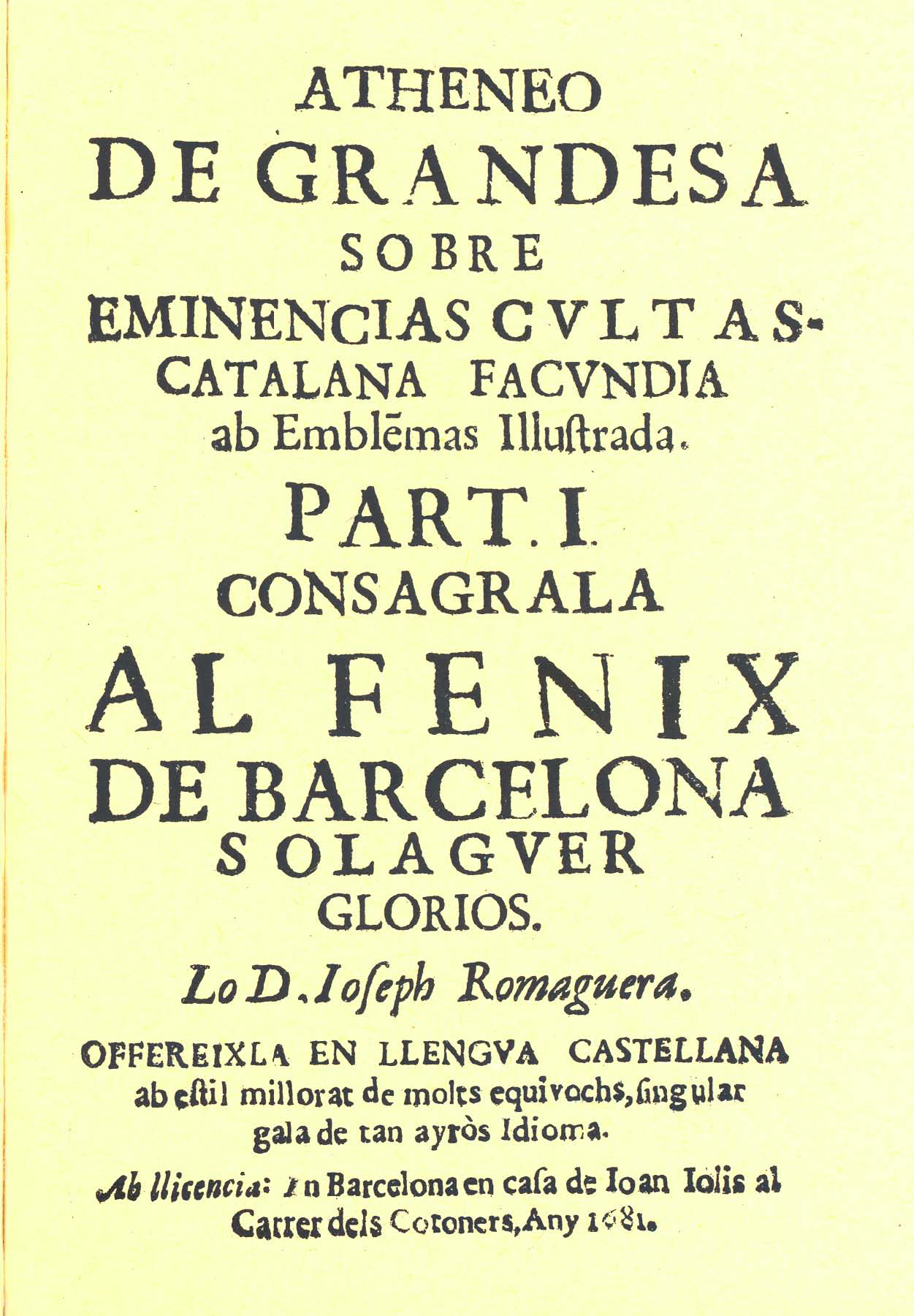 Title page from Josep Romaguera's 1681 Atheneo de Grandesa (Barcelona: Joan Jolis, 1681); Facsimile: Barcelona, Lletra Menuda, 1980. pp.14-15.